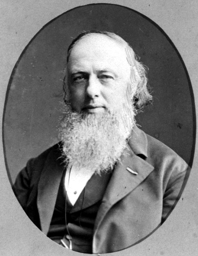 Johan Frederik Metzelaar (1818-1897), architect